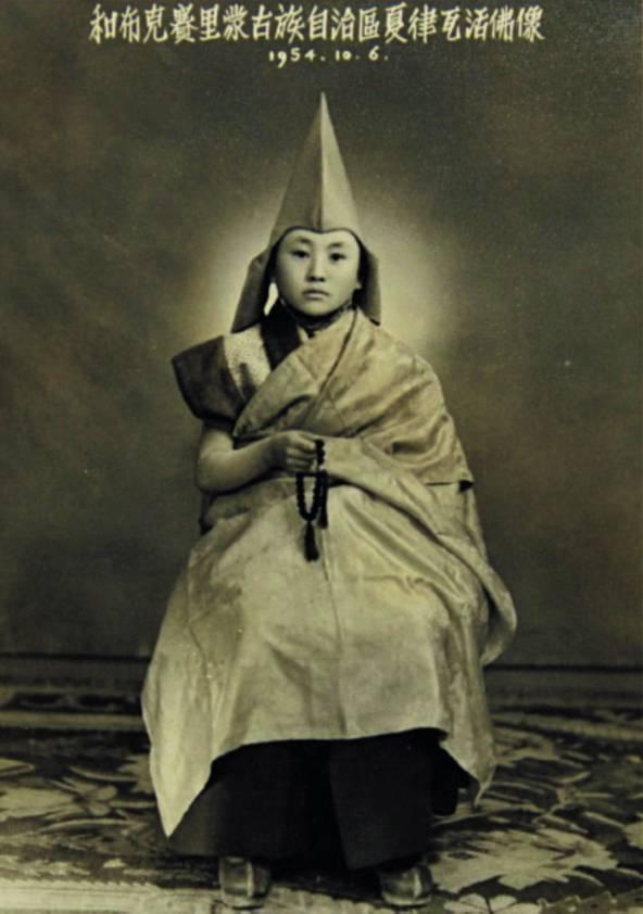 1954年摄于和布克赛里蒙古族自治区（位于新疆维吾尔自治区西北部，准噶尔盆地西北边），保存完好。作者简介：十四世夏律宛活佛（1942-），是扎萨克和雄布热斯苏木牧民托德巴音布勒格之子，原名格桑图布登伯尔勒嘉措。1949-1956年，在县王爷府寺庙念经。1957年6月-1959年，去青海省塔尔寺学习佛法。1960-1963年，在北京中央民族学院学习。后为新疆维吾尔族自治区政协常委，中国佛教协会理事、新疆佛教协会会长。